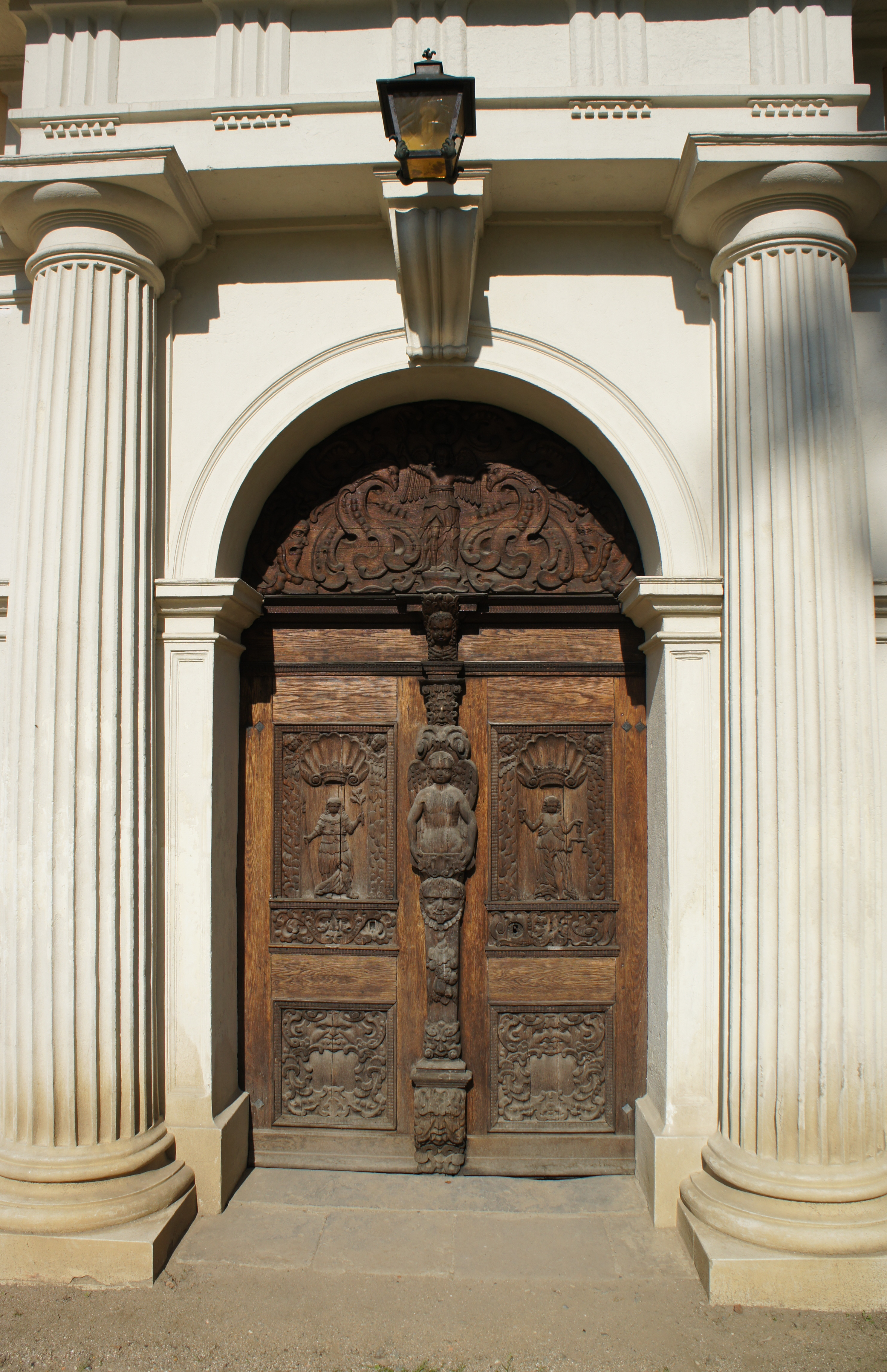 Schloss Hermsdorf wurde Mitte des 15. Jahrhunderts als Herrensitz durch Otto von Carlowitz gegründet. In Besitz u.a. von Kurfürst Christian II., Johann Georg II., Hofmarschall Georg Freiherr von Rechenberg, Adam Heinrich von Flemming und Prinz Georg von Schönburg-Waldenburg. Seit dem 2. Weltkrieg bis 1999 Seniorenheim, heutige Nutzung des Schlosses und des Parkes für Trauungen und kulturelle Veranstaltungen. Hier: Eingang an Südseite mit Schnitzereien von Franz Rädlein